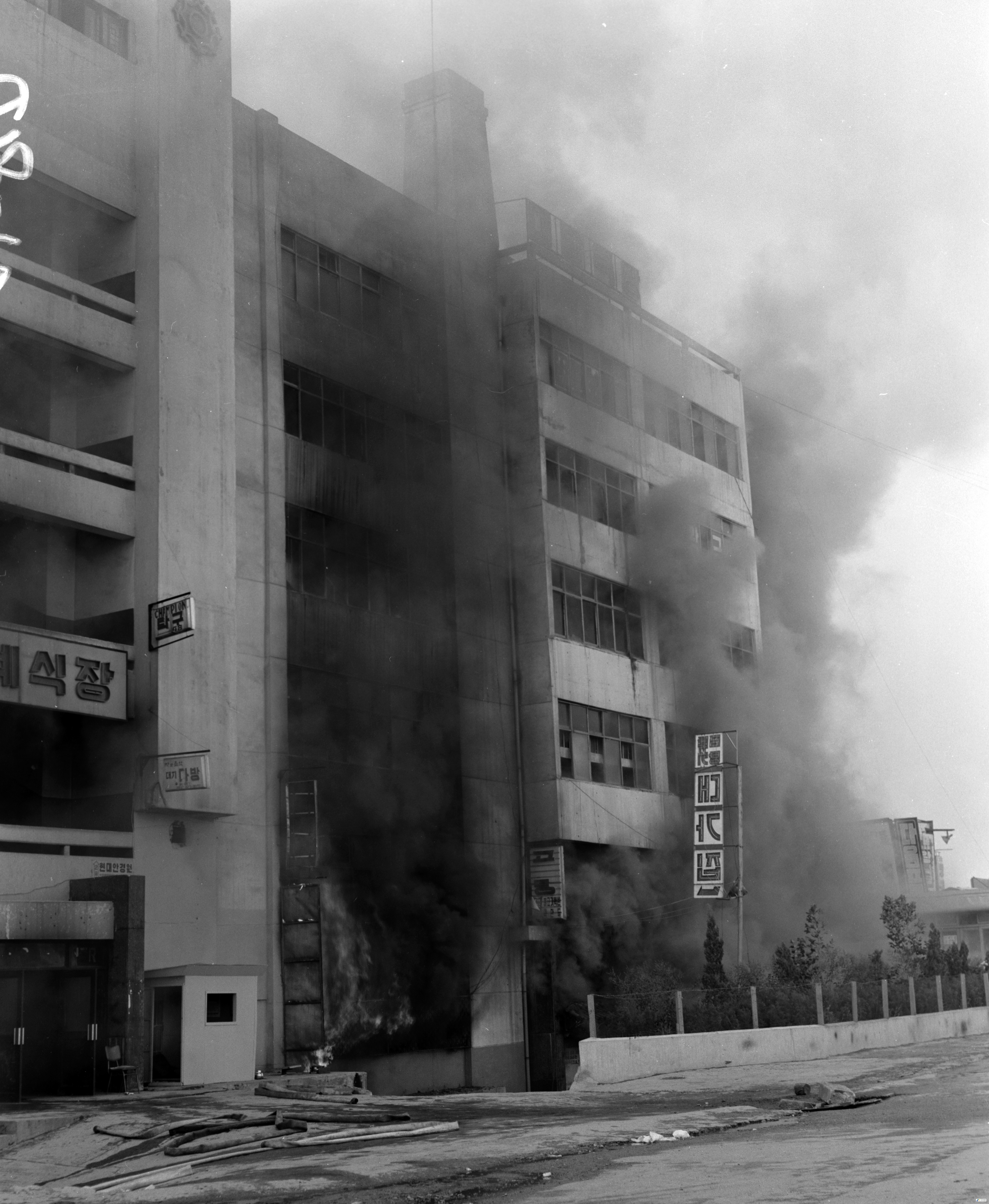 대왕코너 화재 사고